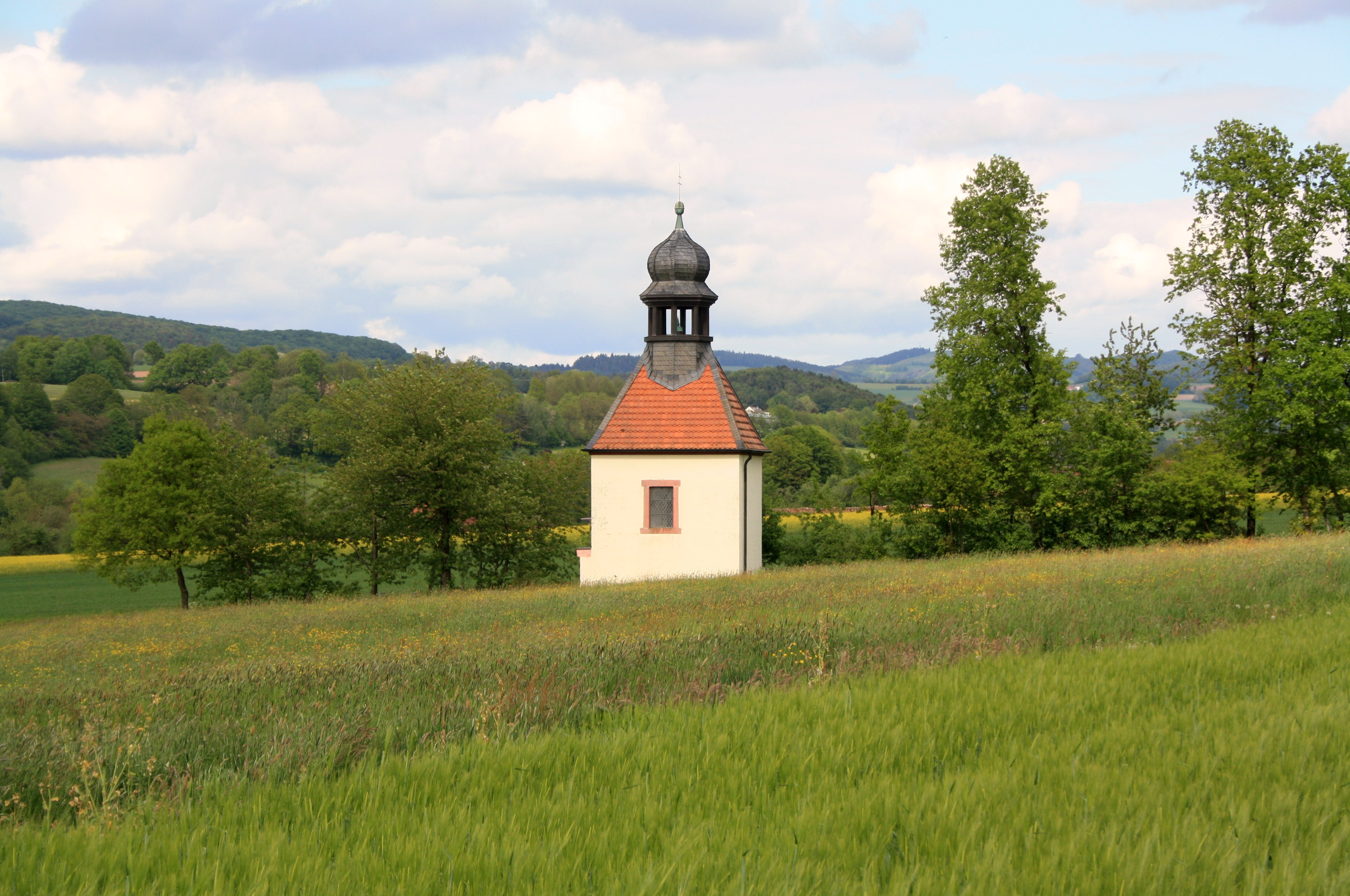 Dier Kapelle mit der Rhön im Hintergrund